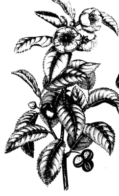 Zeichnung einer Teepflanze aus dem 19. Jahrhundert - Lizenzstatus: Public Domain